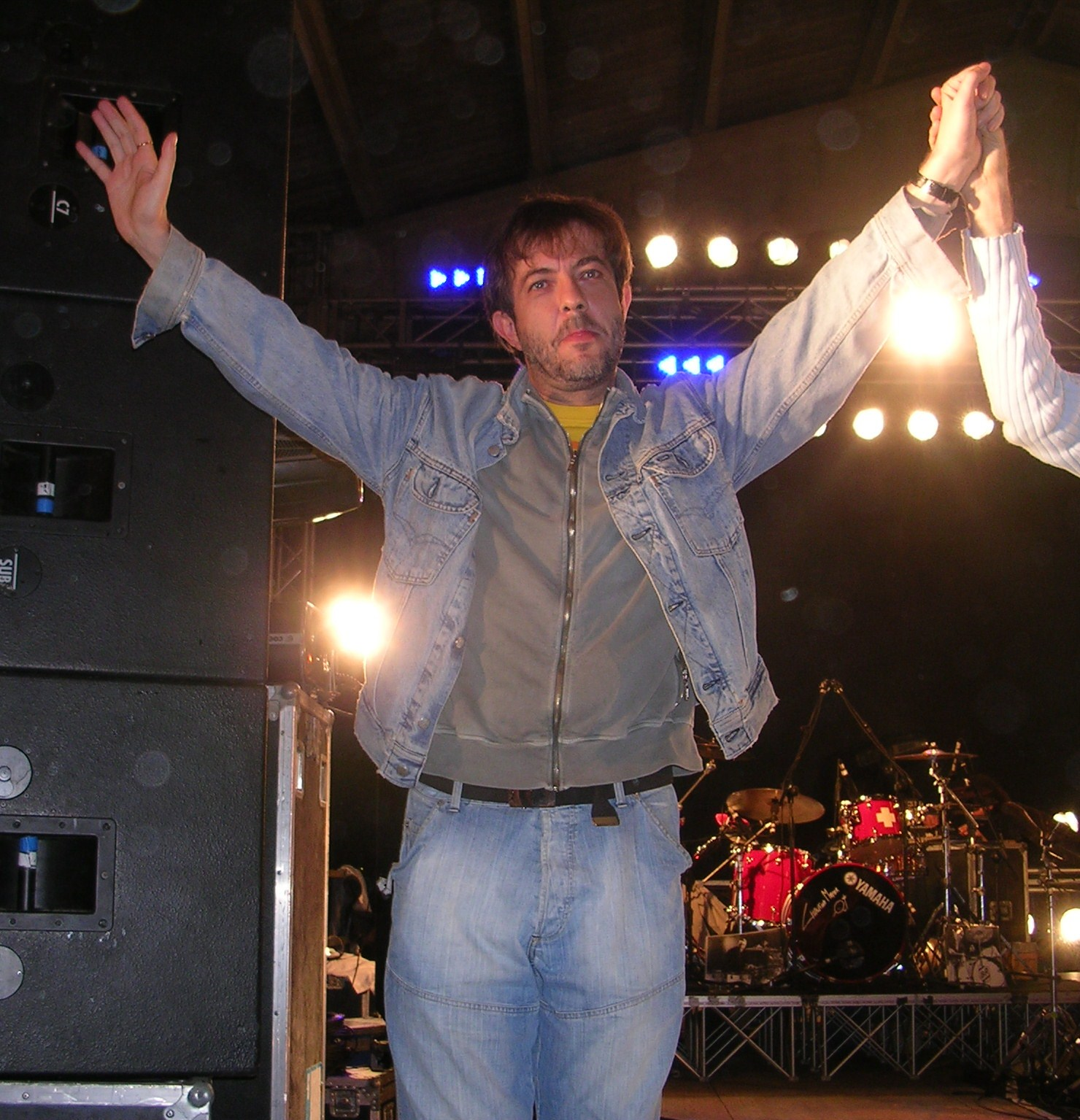 Rocco Tanica, tastierista di Elio e le Storie Tese